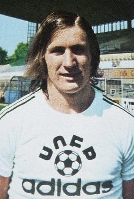 Léonard Specht en 1974 (RC Strasbourg), 'Ageducatifs 1974 - 1975', Panini figurina n°242.